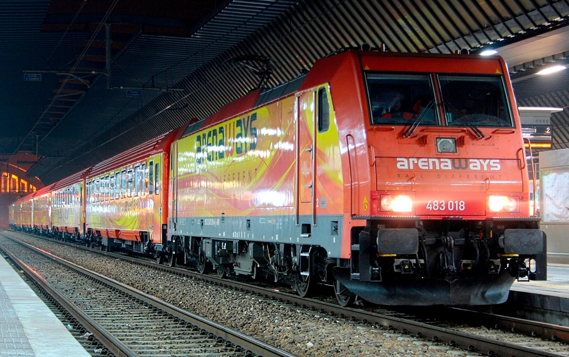 La locomotiva E 483.018 di Arenaways a Milano Rogoredo.